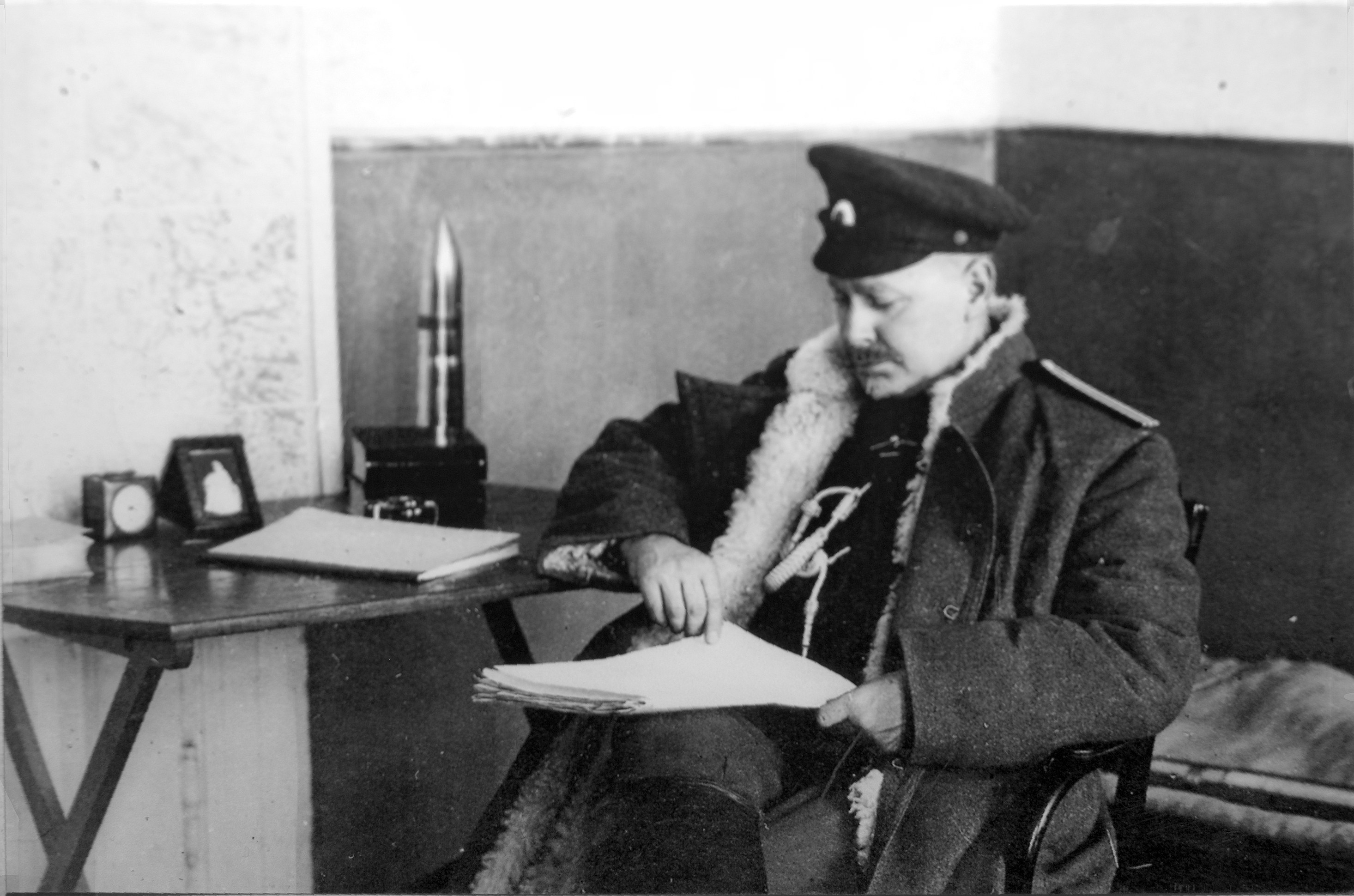 Алекса́ндр Алекса́ндрович Самойло 23 октября (4 ноября)1869, Российская Империя, Москва — 8 ноября 1963, СССР, Москва) — русский и советский военачальник, участник Первой мировой и Гражданской войн. Командующий красным Восточным фронтом в мае 1919 года. Генерального штаба генерал-майор (до 1917). Генерал-лейтенант авиации (1940). Профессор (1943). Член КПСС с 1944 г.